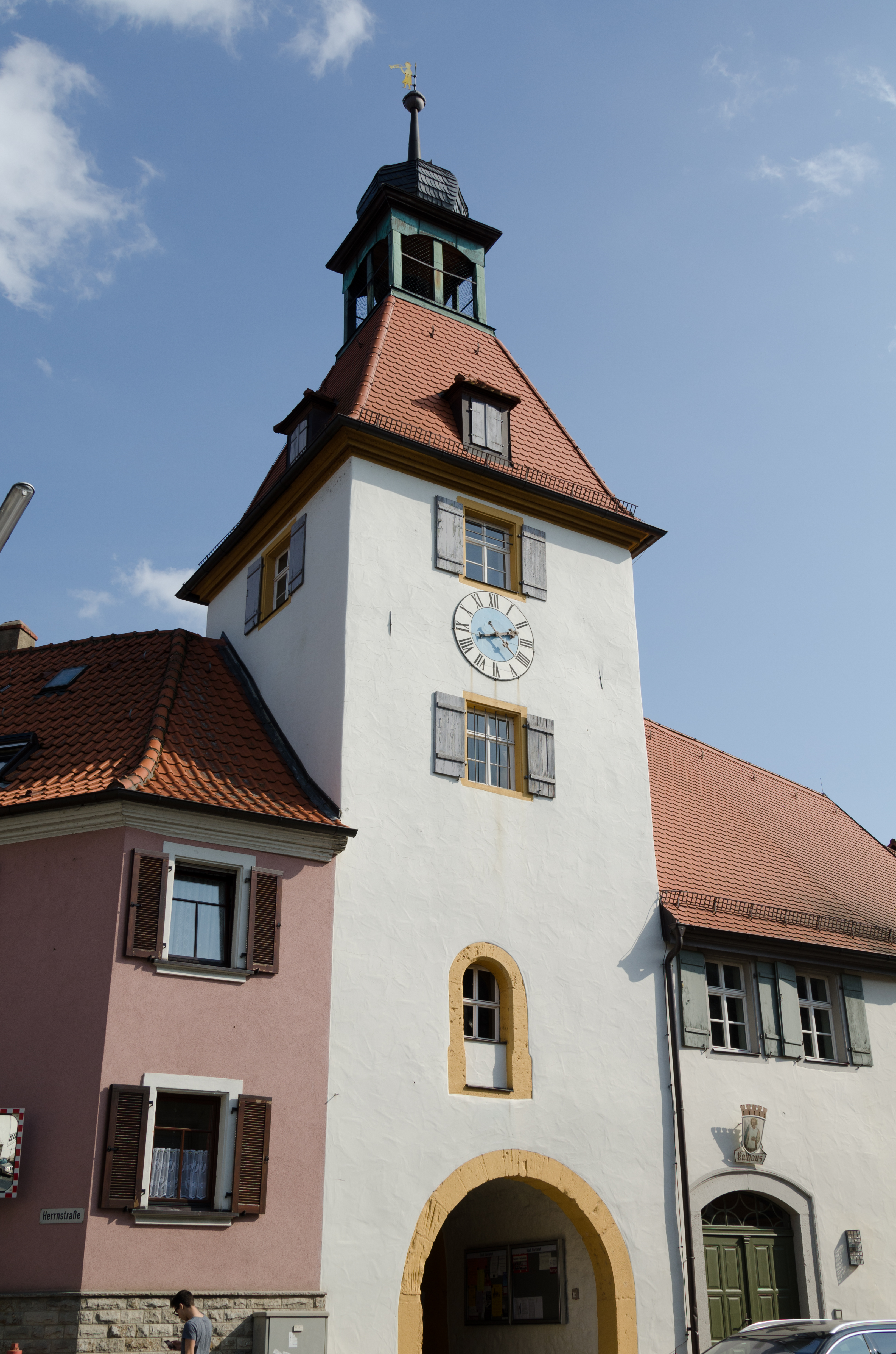 Marktsteft, Kirchenburg